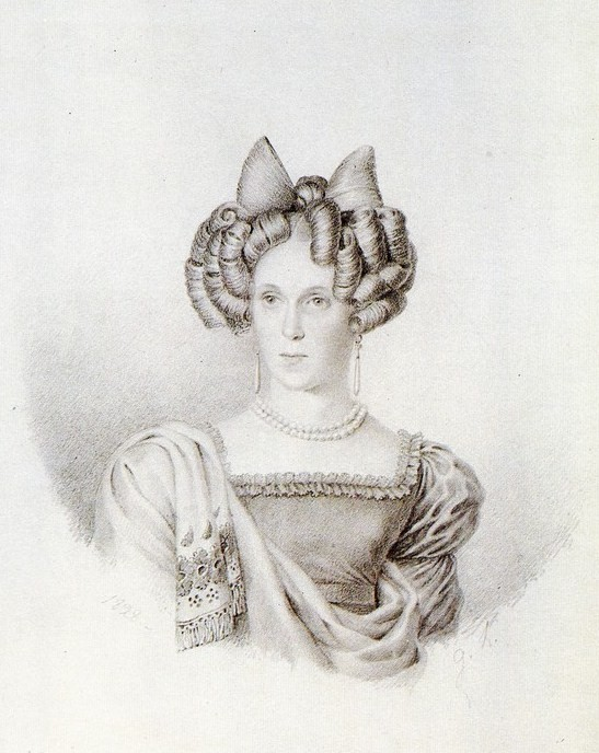 Гурко Татьяна Алексеевна, урожд. баронесса Корф (1795-1840), жена В.И.Гурко.